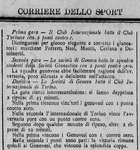 Articolo di giornale che riporta la cronaca del primo campionato di calcio italiano, disputatosi l'8 maggio 1898. Il testo rappresenta la più antica fonte scritta sui risultati sportivi del torneo. Nota: si ringrazia l'Utente:Erpaolo9 per il contributo al caricamento.